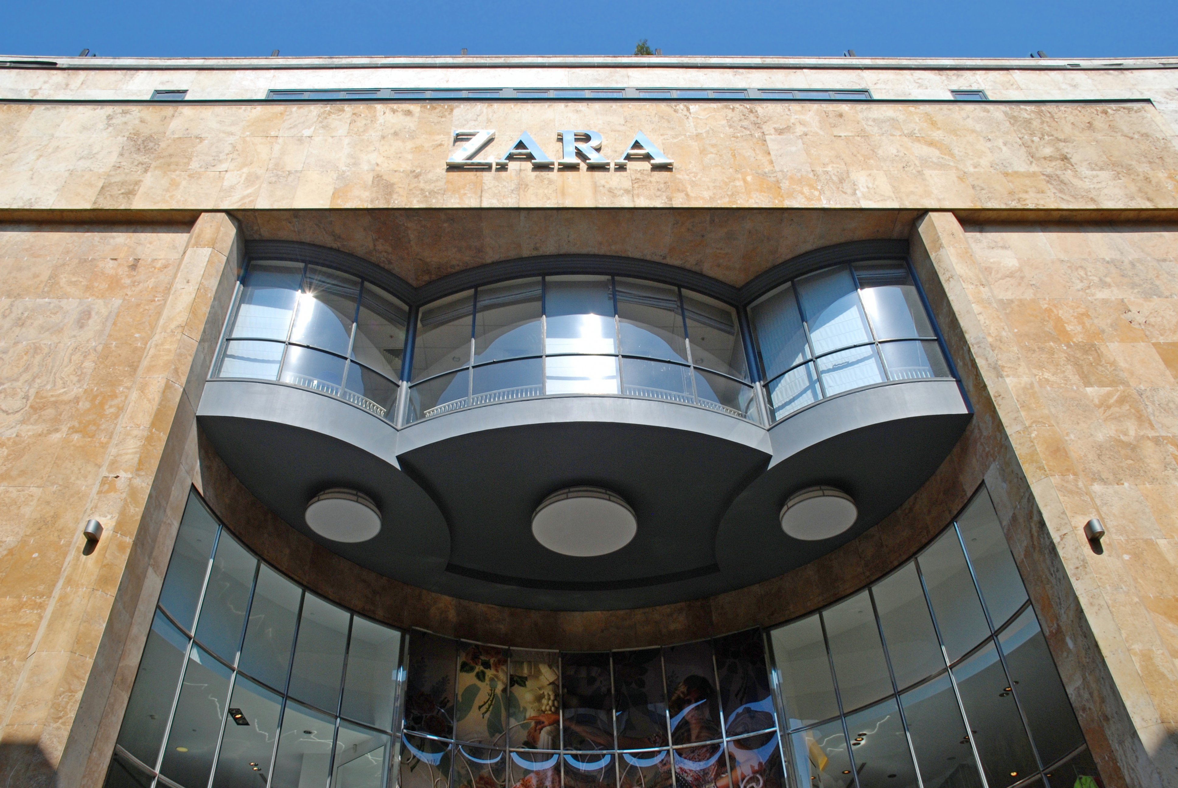 Belgique - Bruxelles - Cinéma Métropole (Adrien Blomme)